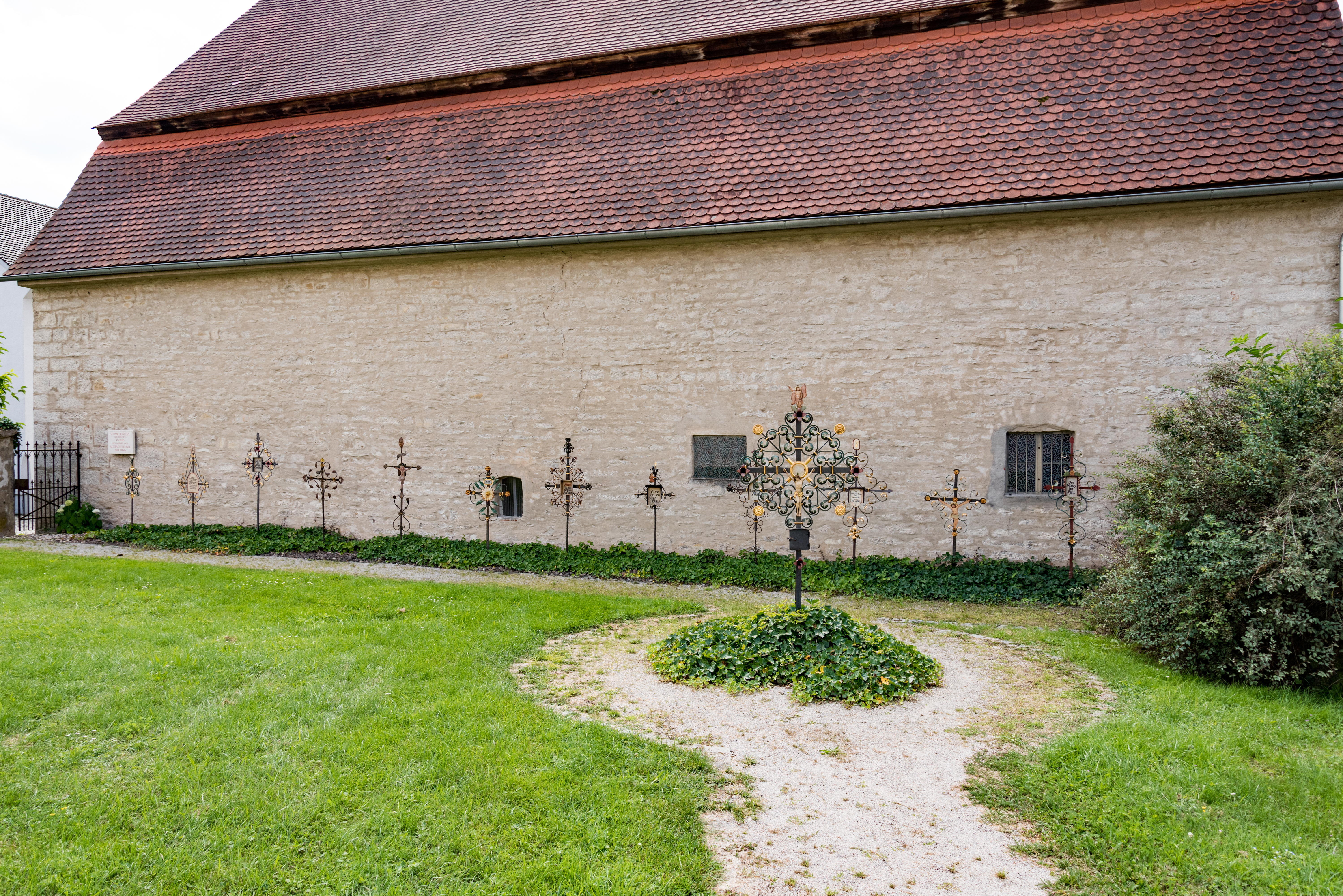 Berching, St.-Lorenz-Straße 2, Friedhofskreuze